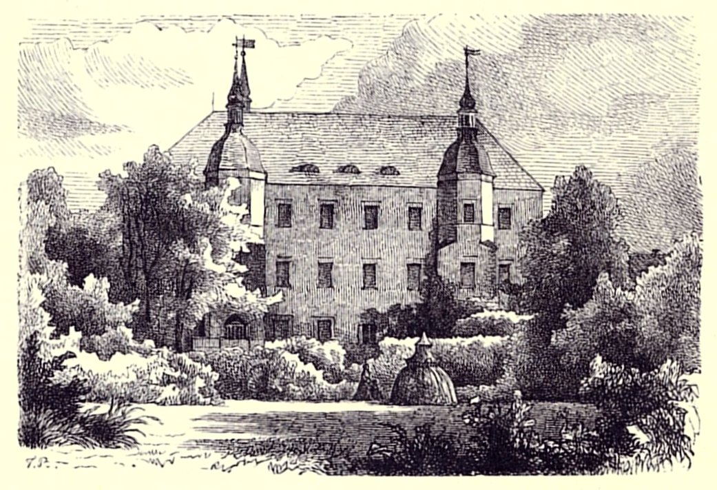 Kliczków - zamek (zabytek nr 452 z 3.06.1957)